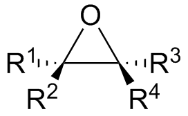 环氧化合物